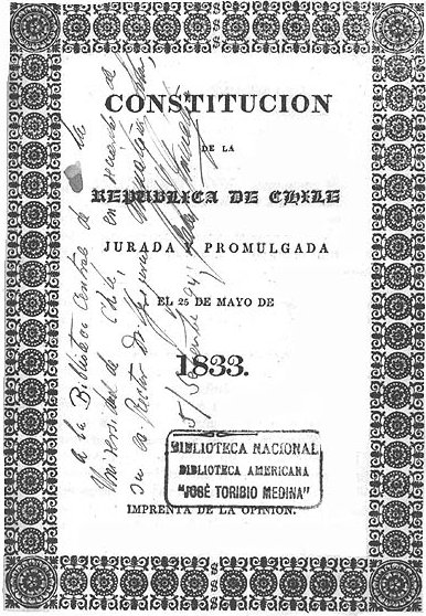 Portada de un ejemplar de la Constitución de la República de Chile de 1828. Santiago: Imprenta de La Opinión, 1833